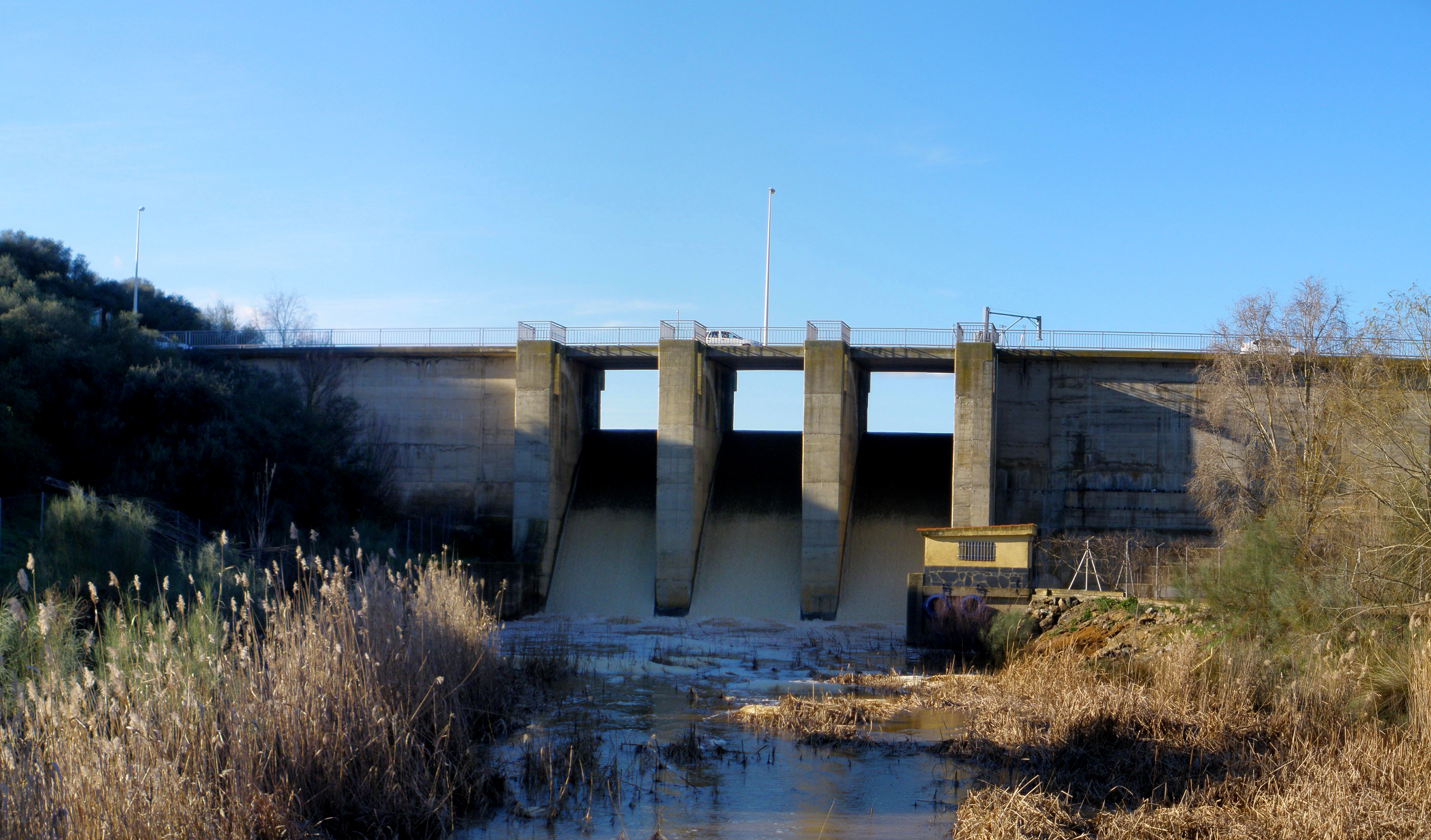 Embalse de Los Canchales, provincia de Badajoz, España.